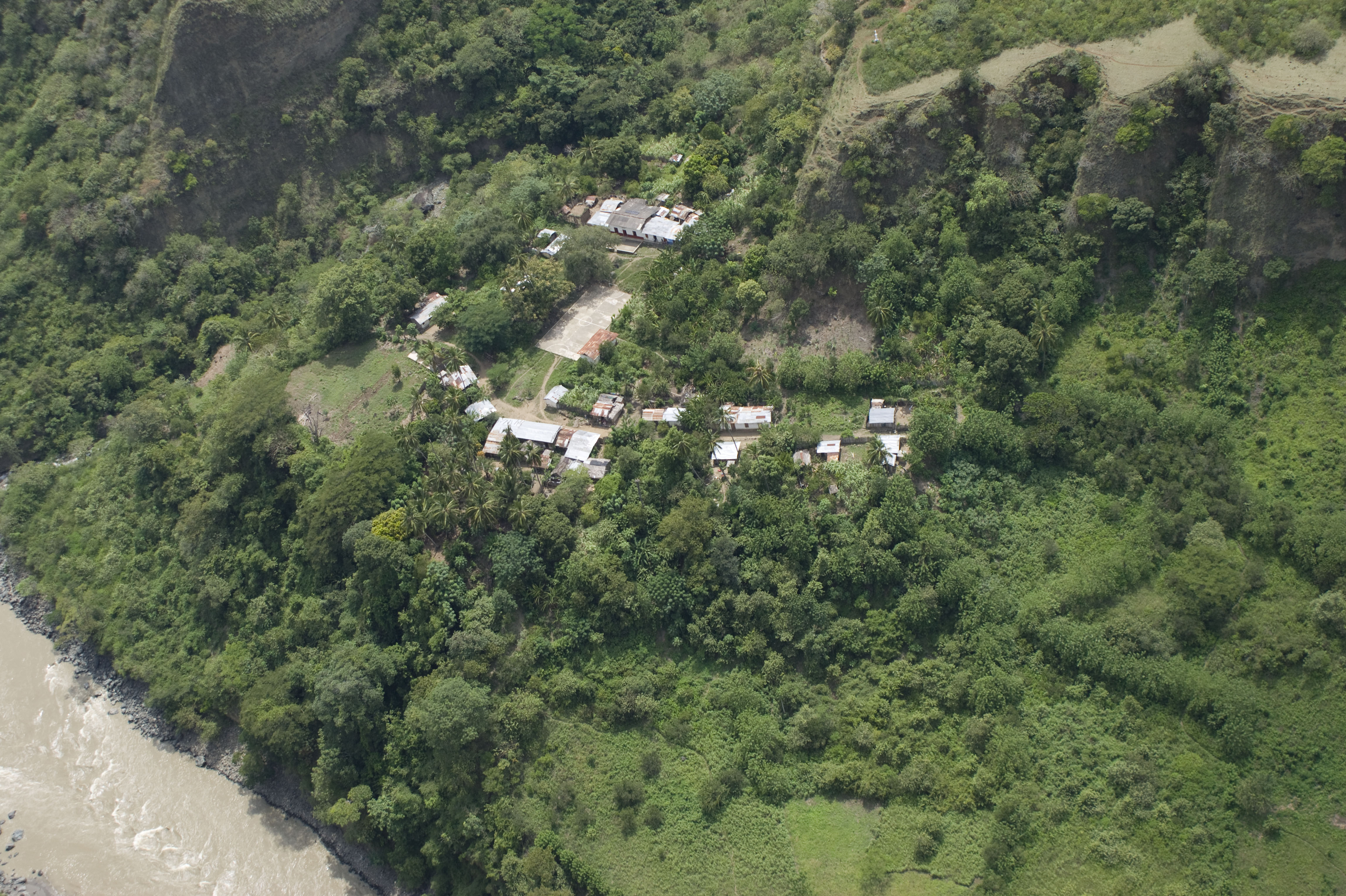 Barbacoas, Peque, en el departamento de Antioquia, donde se ejecutan las obras de Hidroituango.